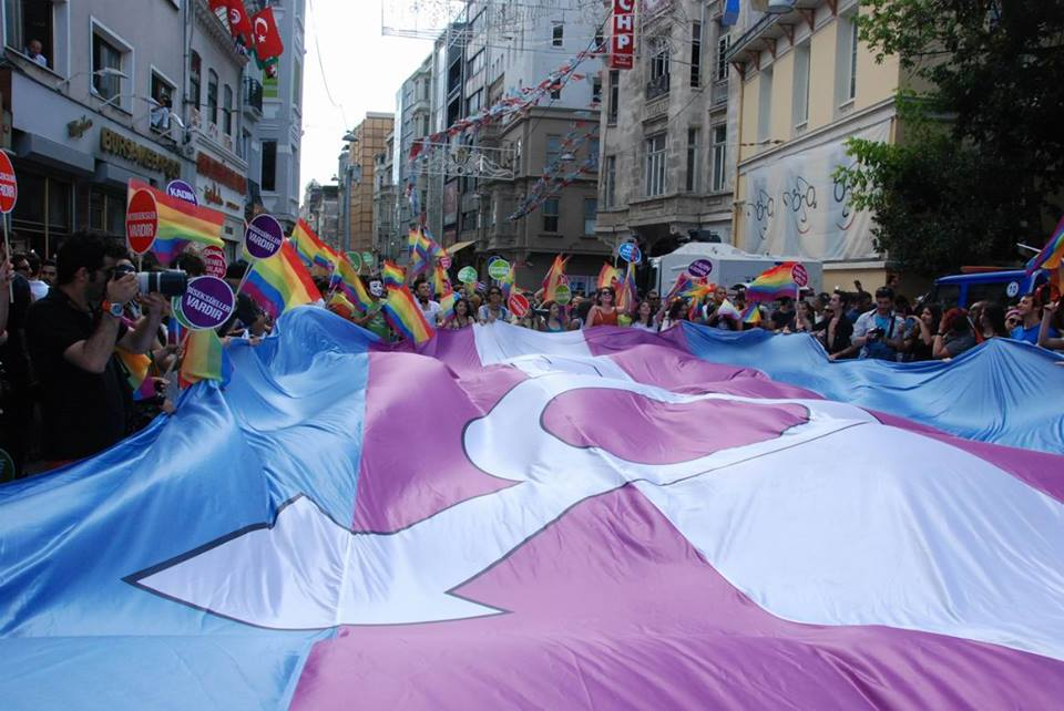 XXII. İstanbul Onur Haftası etkinlikleri kapsamında geleneksel olarak yapılan İstanbul Onur Yürüyüşü'nden görünüm, 2014.